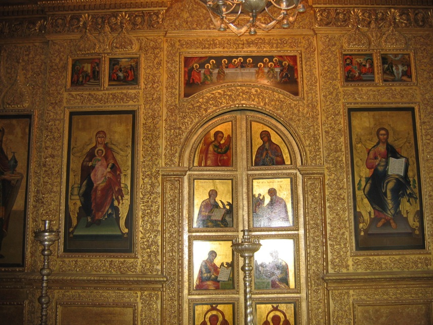 Icones interieur de la cathédrale Saint-Basile (monument de la place rouge à Moscou en Russie).